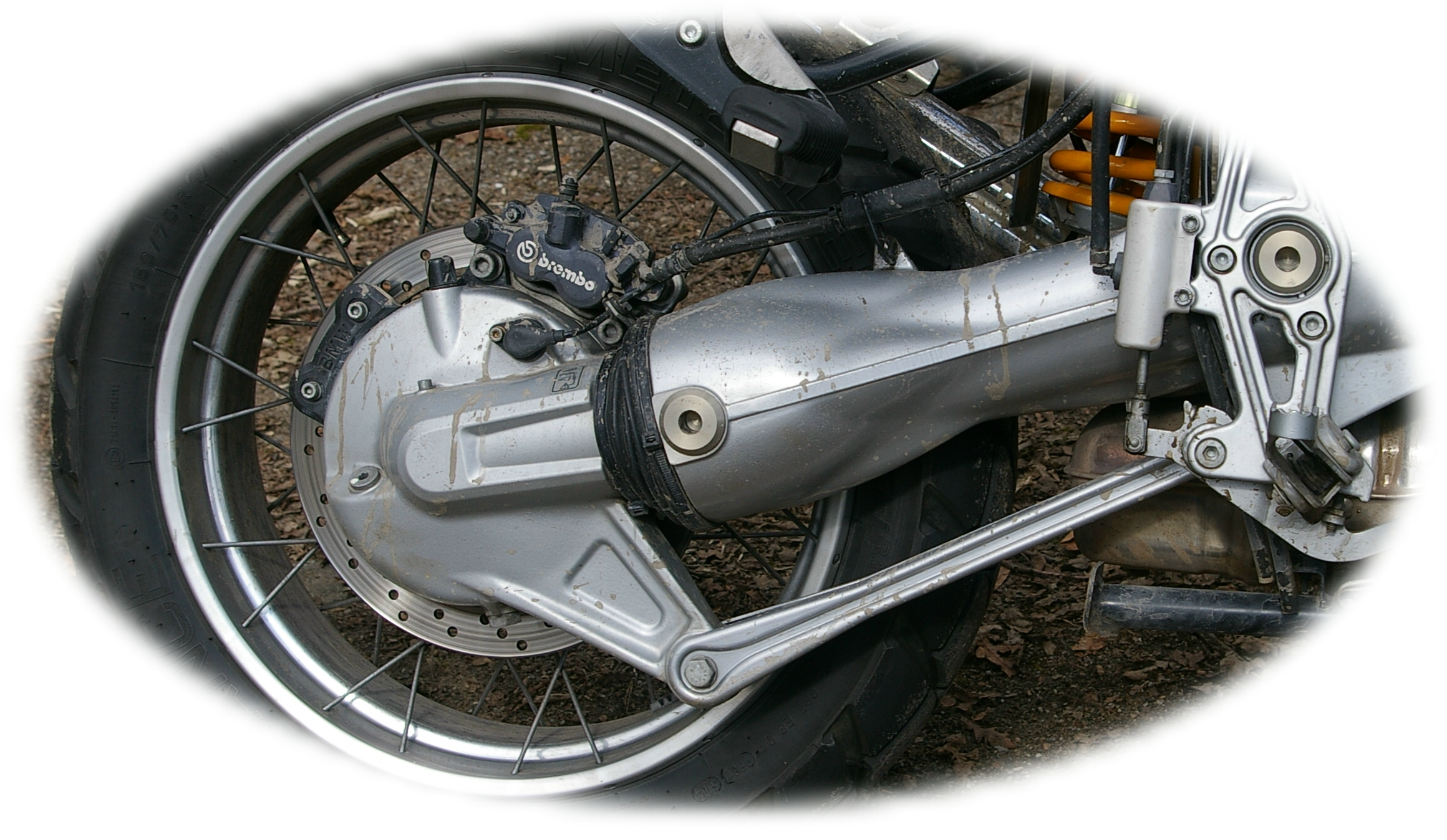 Paralever-Hinterradschwinge der ersten Bauart (hinteres Gelenk in Linie der Kardanwelle, Lenker unten), Haltern